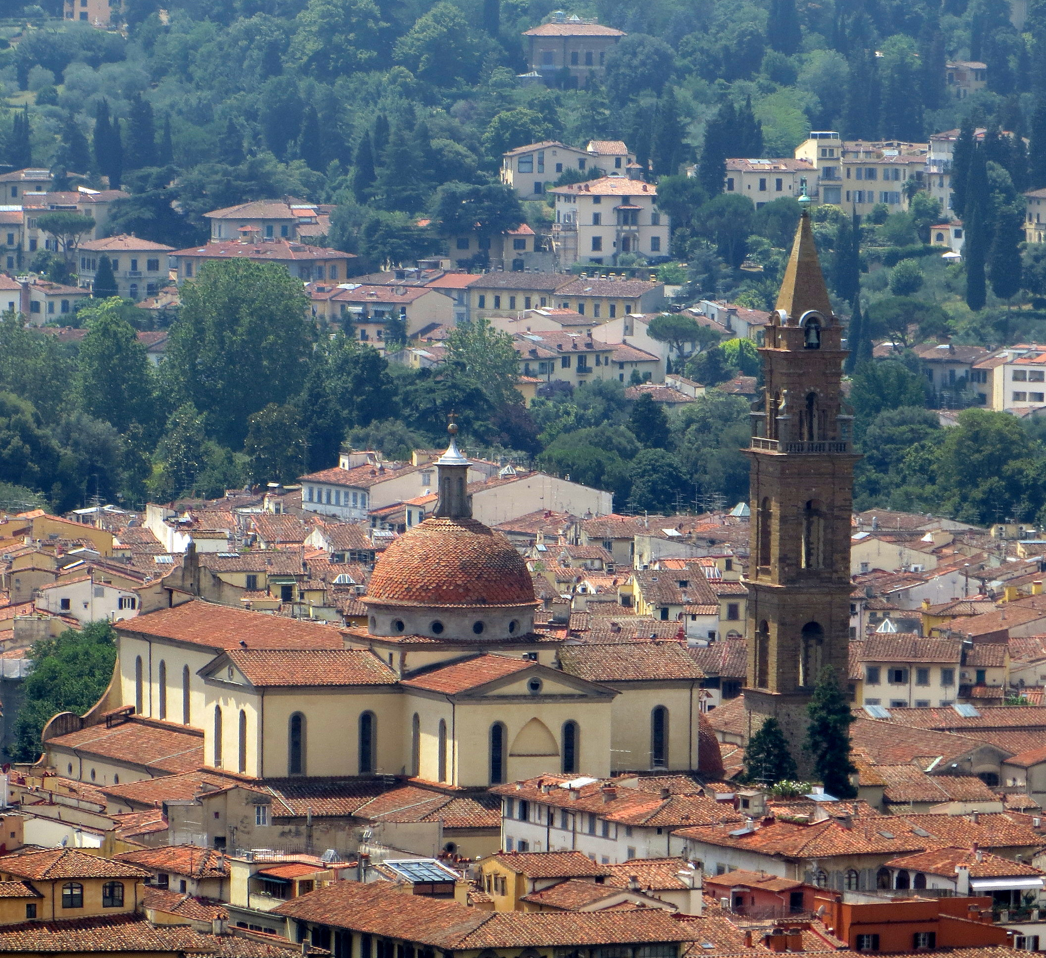 Chiesa di Santo Spirito dalla cupola del Duomo